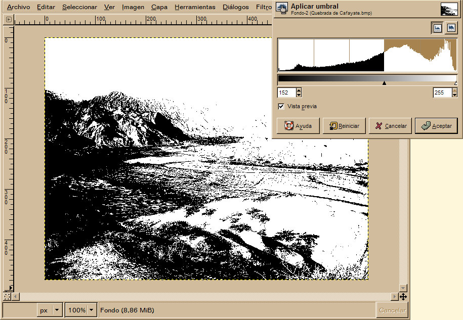 Ejemplo de filtro de umbral de color en Gimp.